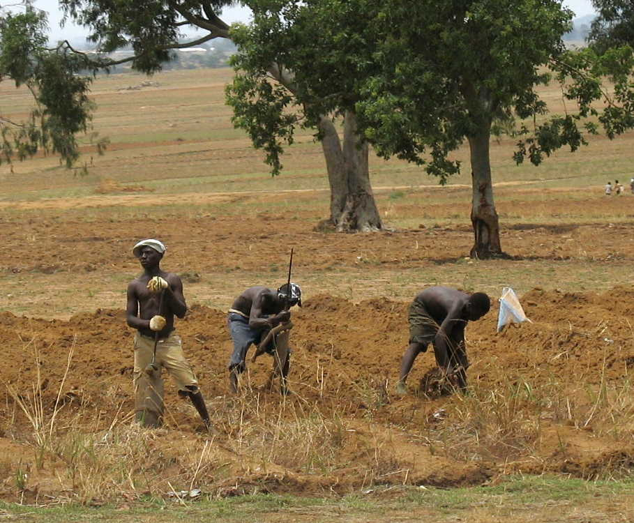 Nigerian farmers working in field in Middle Belt